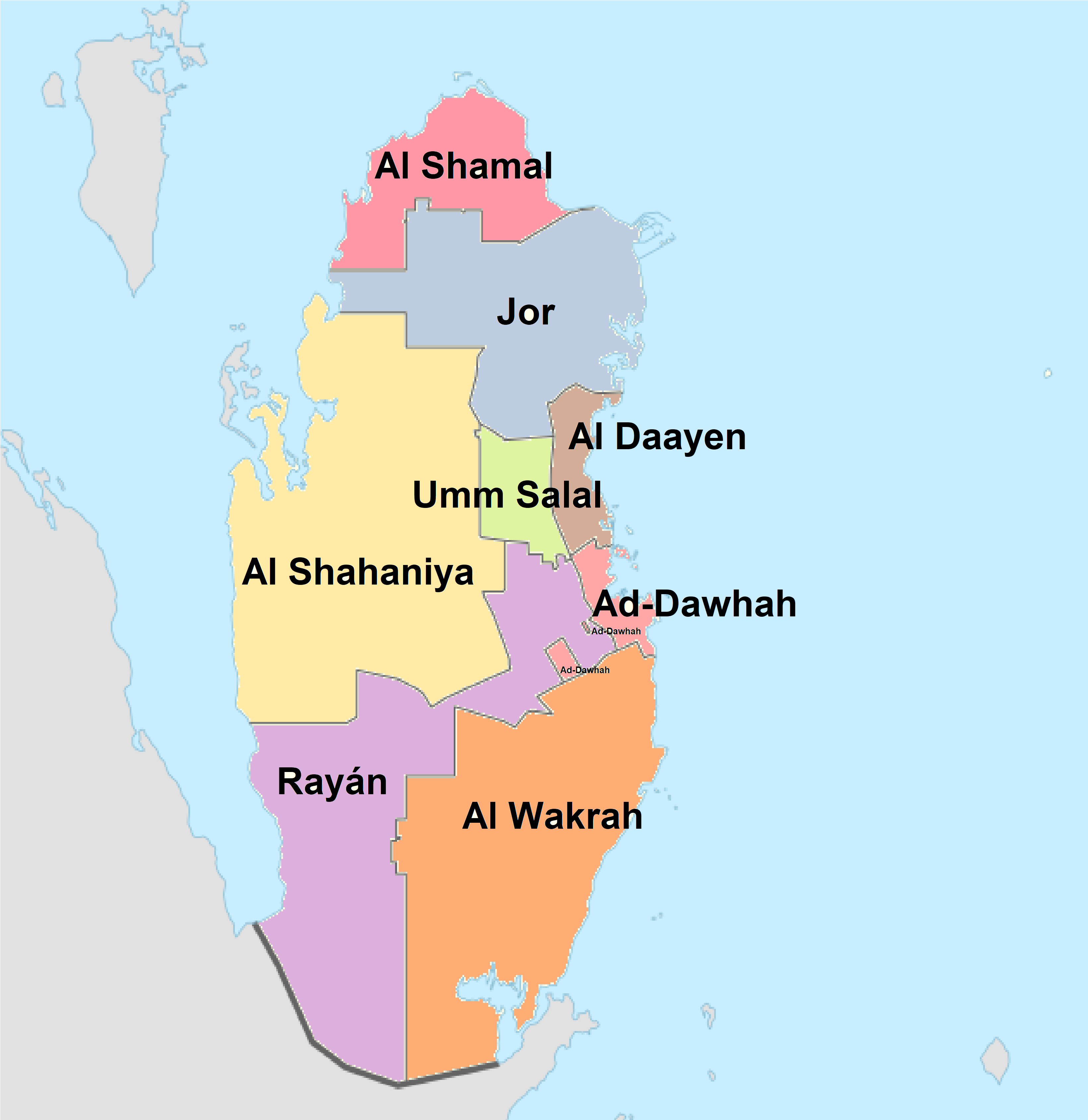 Organización territorial de Catar con los nombres en español